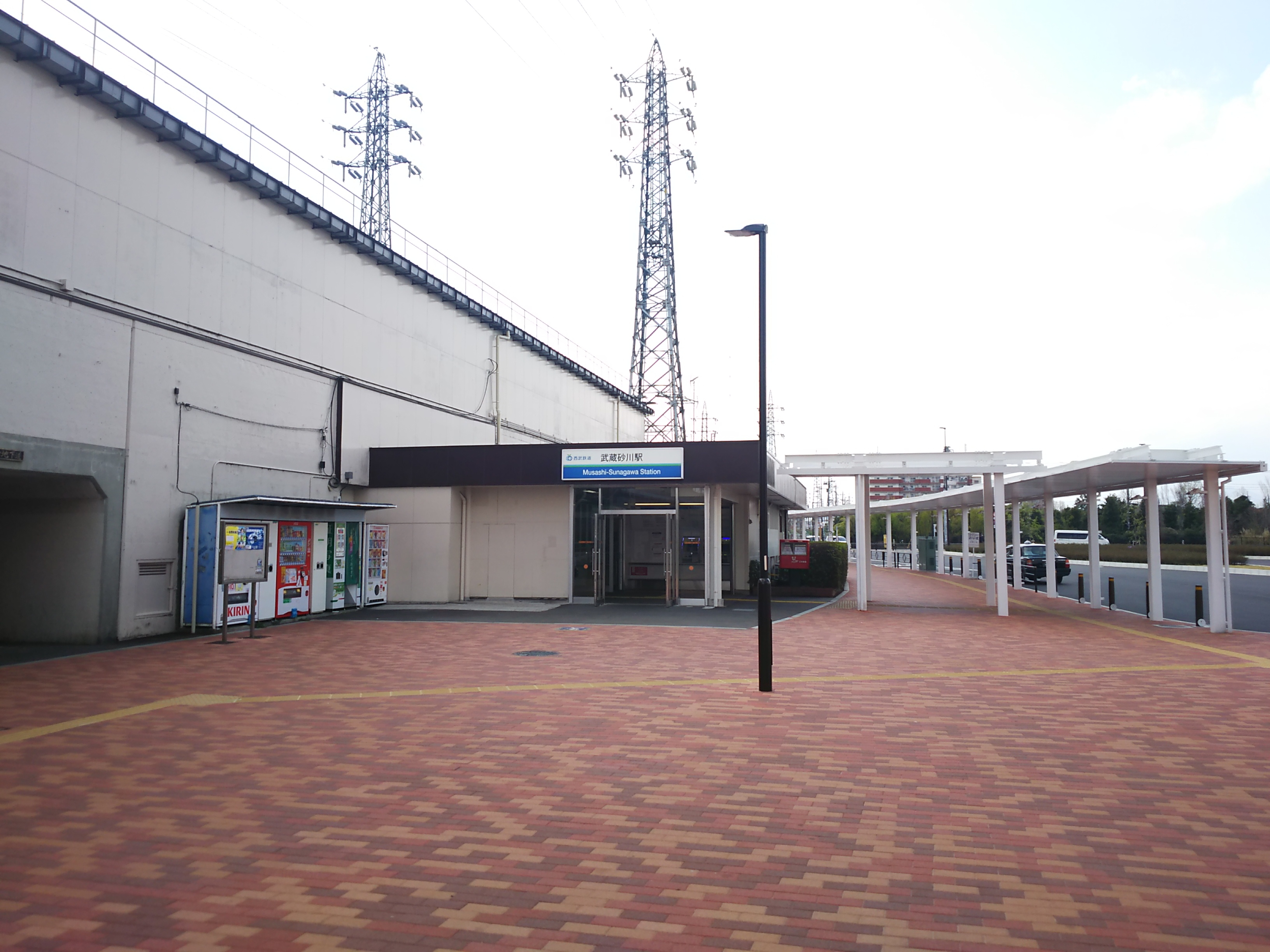 西武拝島線武蔵砂川駅駅舎 2020年4月9日撮影